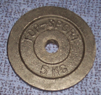 gewichtschijf 5 kg